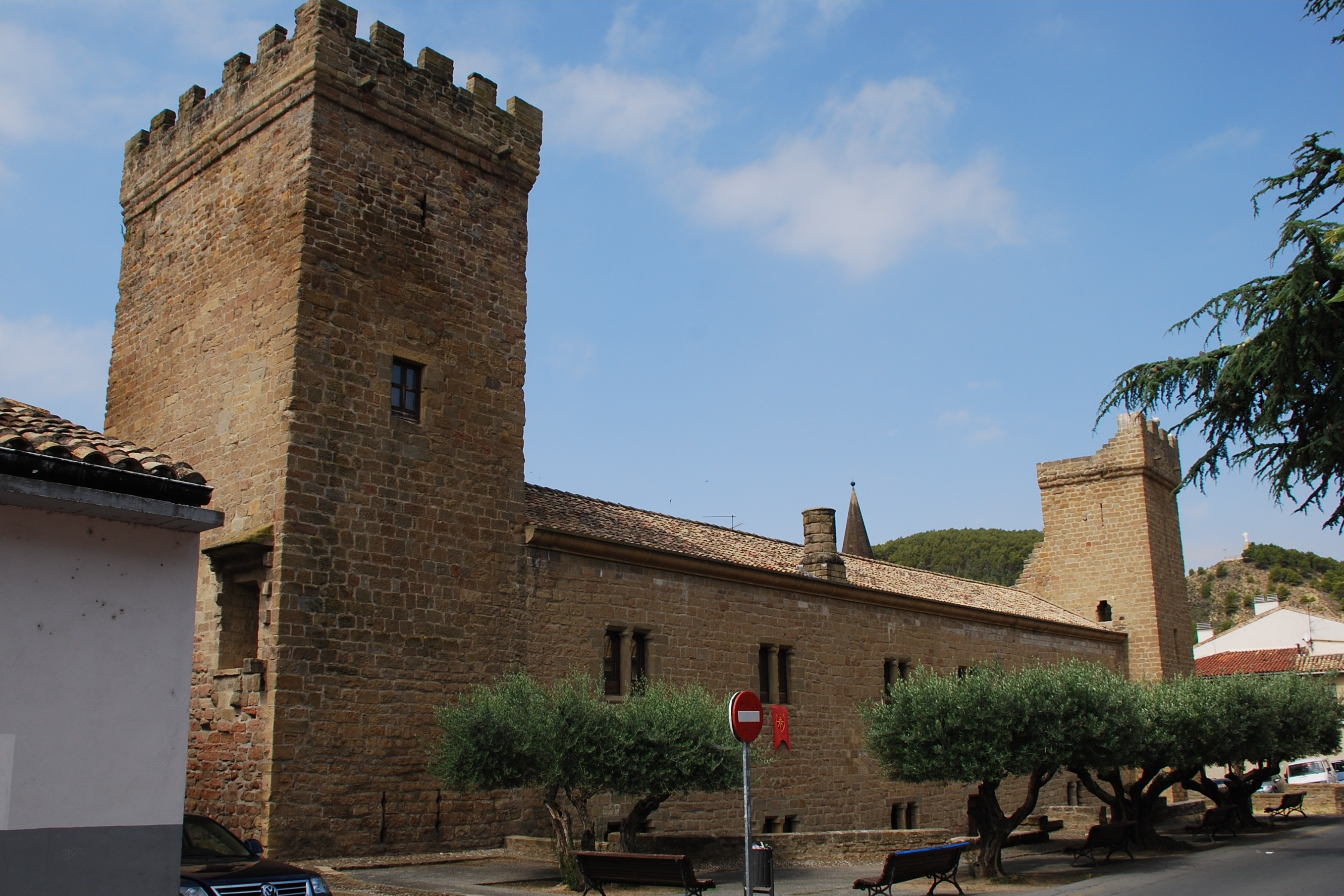 Palacio-castillo del Príncipe de Viana en Sangüesa (Navarra, España)